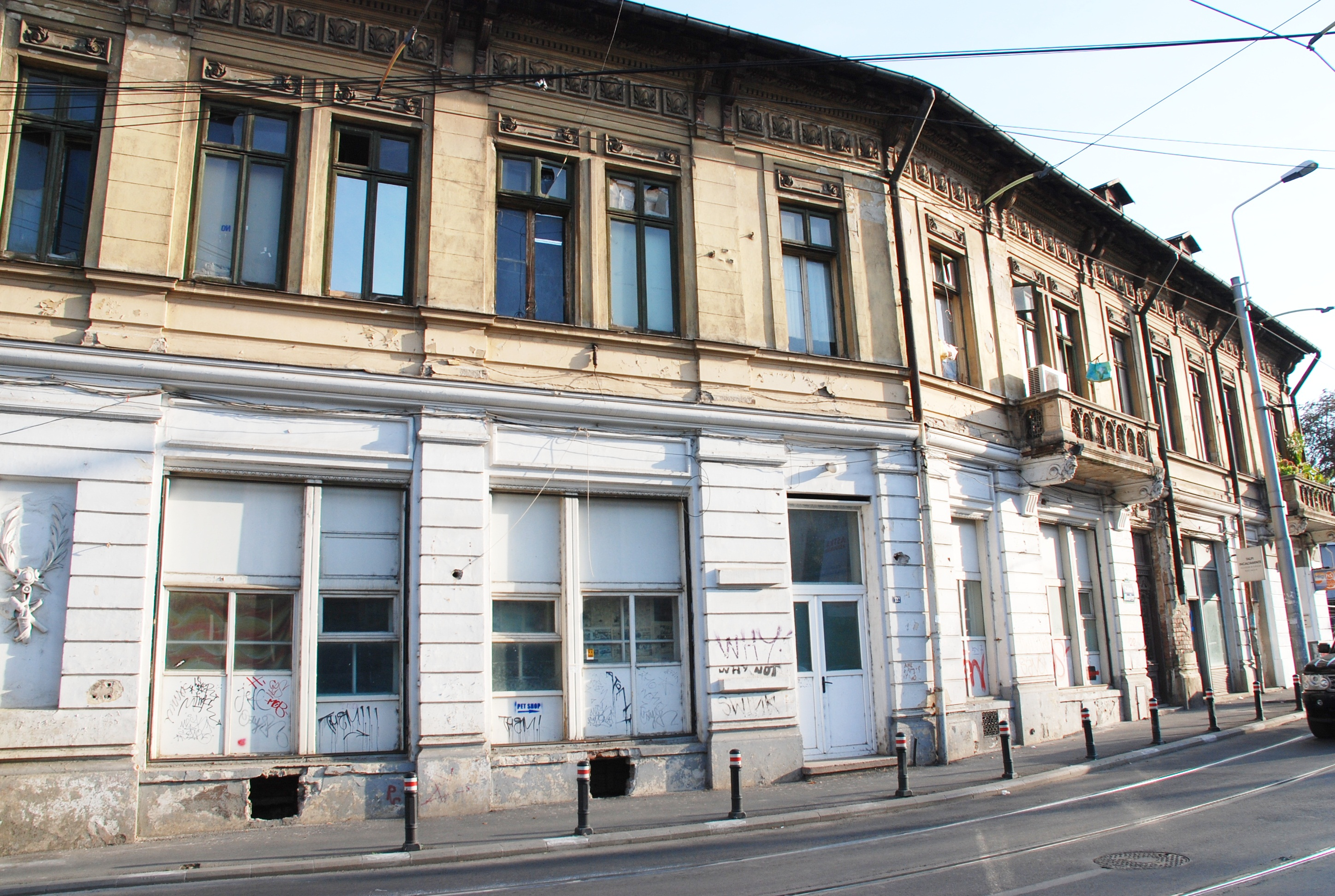 calea mosilor nr 71 sector 2